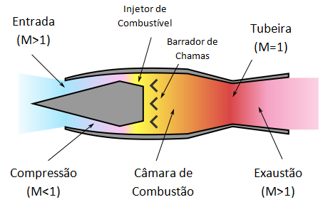 Esboço de como funciona um estatorreator.